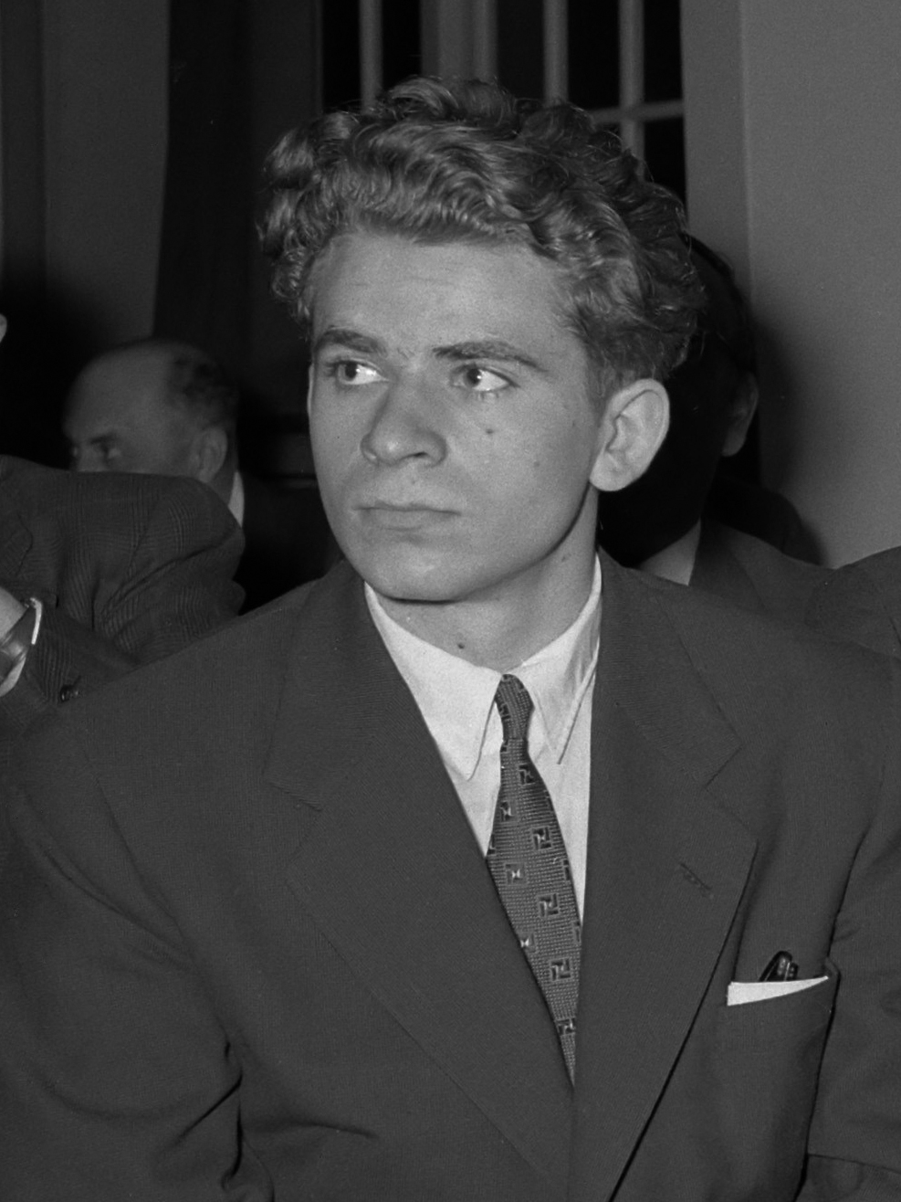 Loting Wereldschaakkandidatentoernooi Amsterdam 26 maart 1956